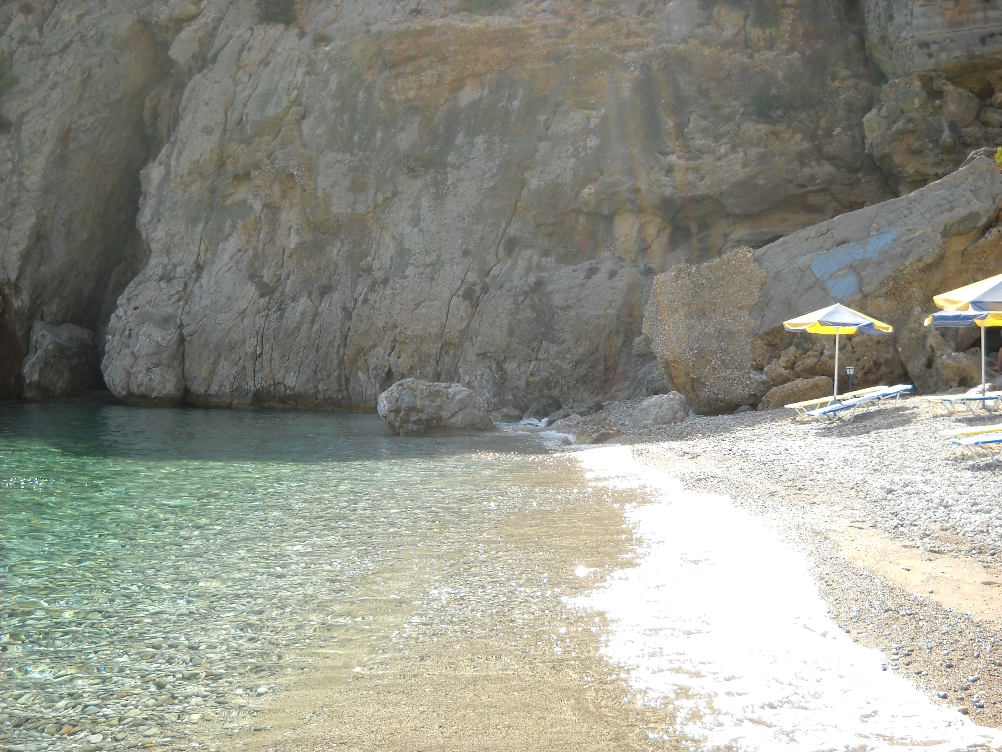 Strand im Süden von Karpathos (Kyra Panagia). Mehr Info Karpathos